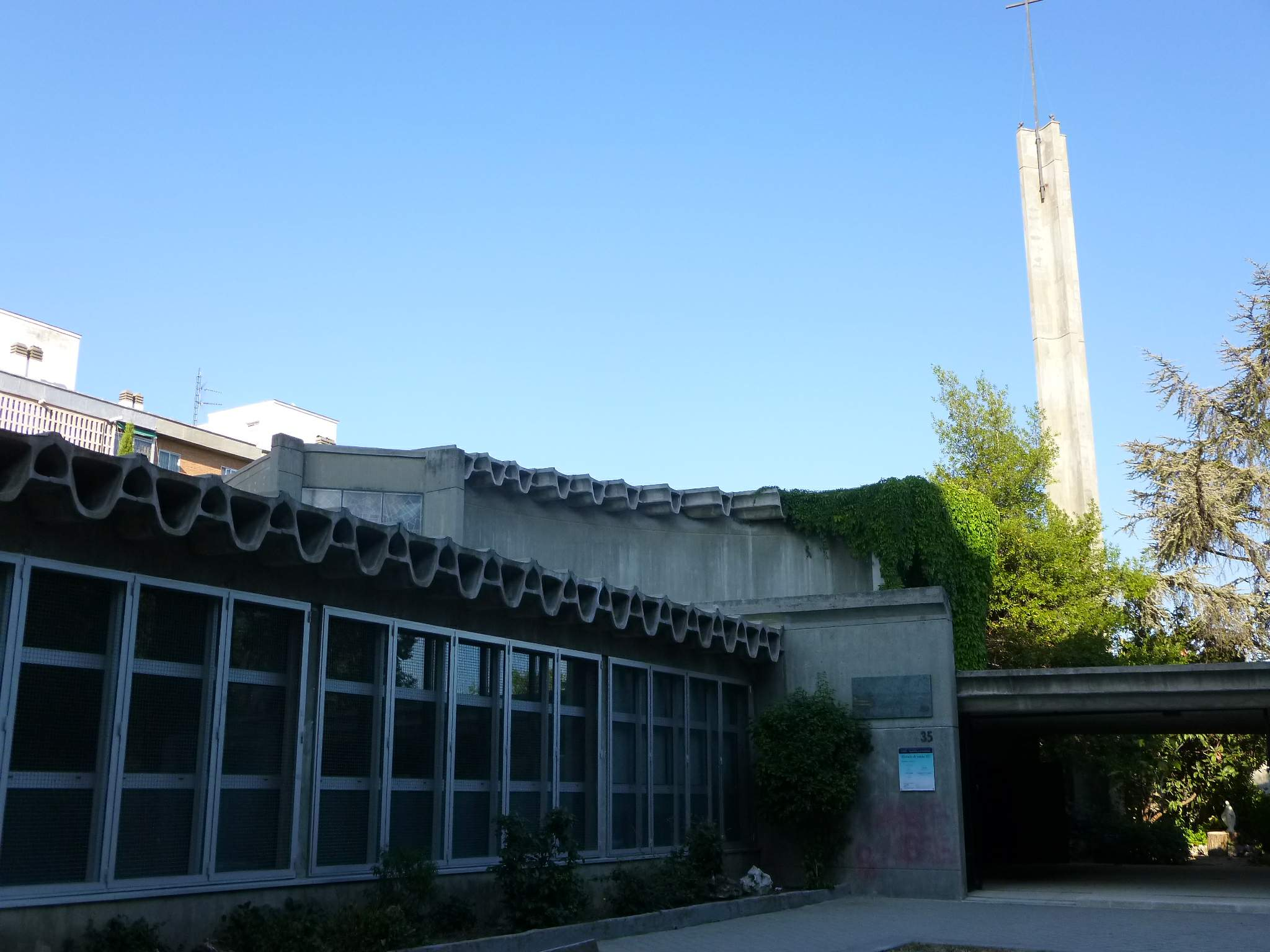 Iglesia de Santa Ana y Nuestra Señora de la Esperanza, en el barrio de Moratalaz de Madrid